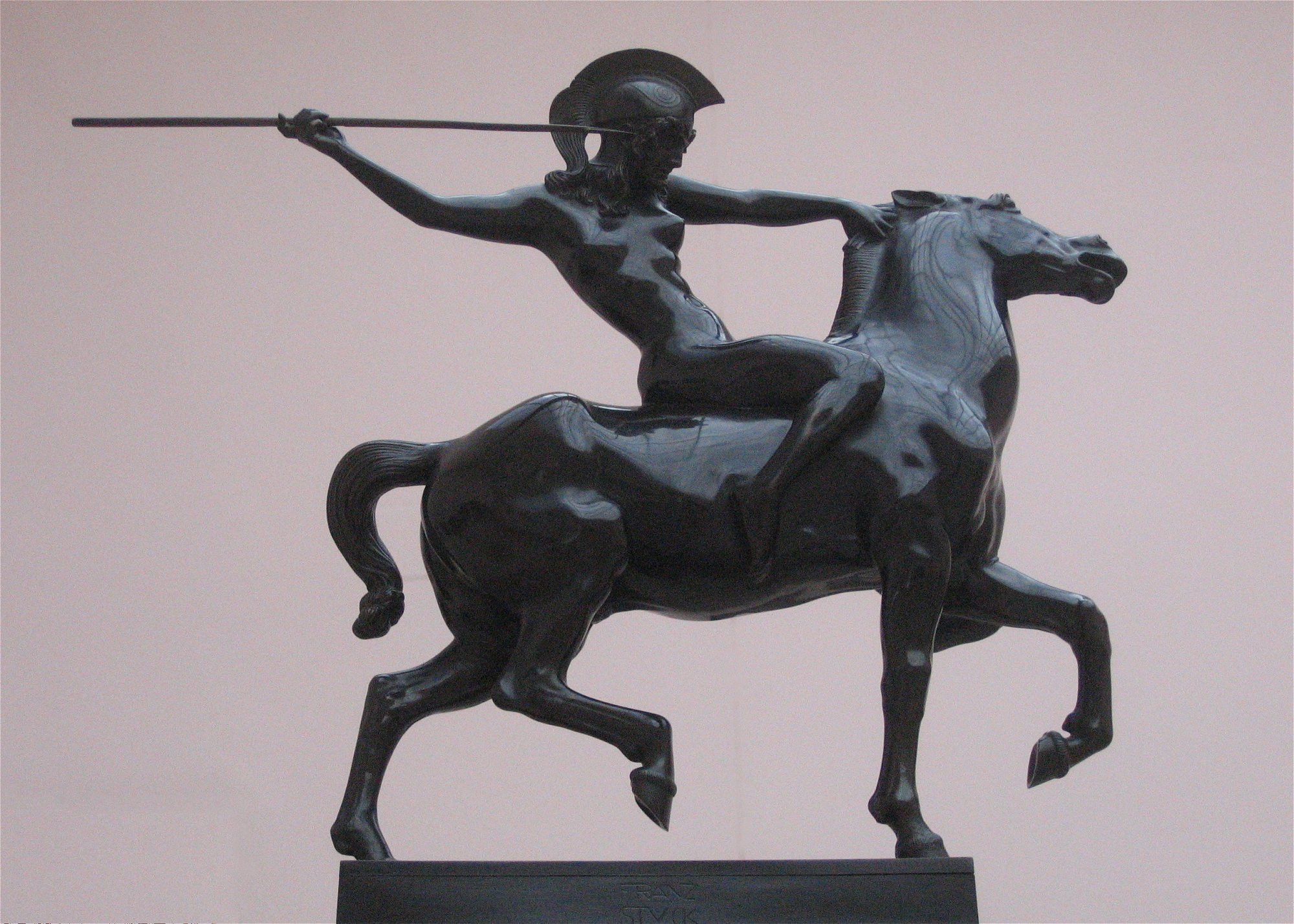 Franz von Stuck, Reitende Amazone, 1897 Lenbachhaus LocationMaxvorstadt , GermanyCoordinates48° 08′ 49″ N, 11° 33′ 49″ E Established1929 Web page control : Q262234 VIAF: 129728232 ISNI: 0000 0001 2156 4241 LCCN: n81058761 GND: 2022696-2 BNF: 118674899 WorldCat institution QS:P195,Q262234